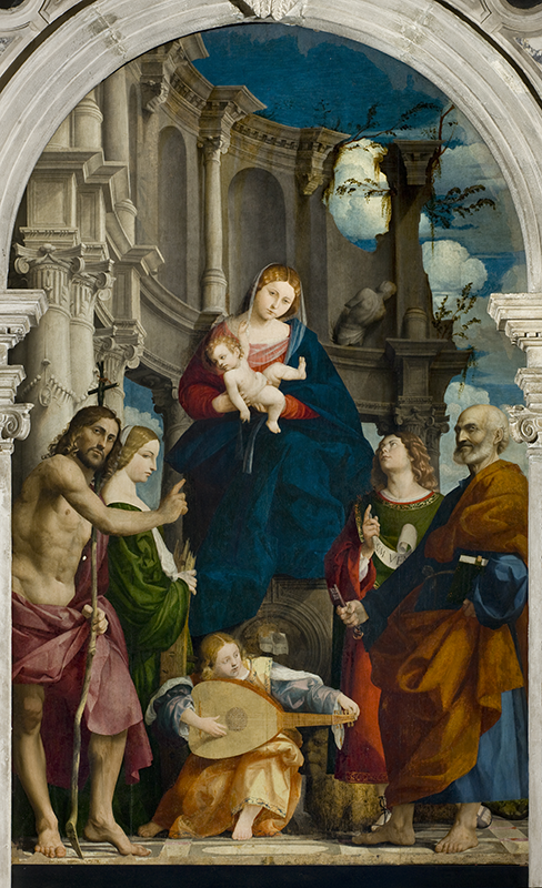 Pordenone - Pala di Susegana Chiesa parrocchiale di Susegana